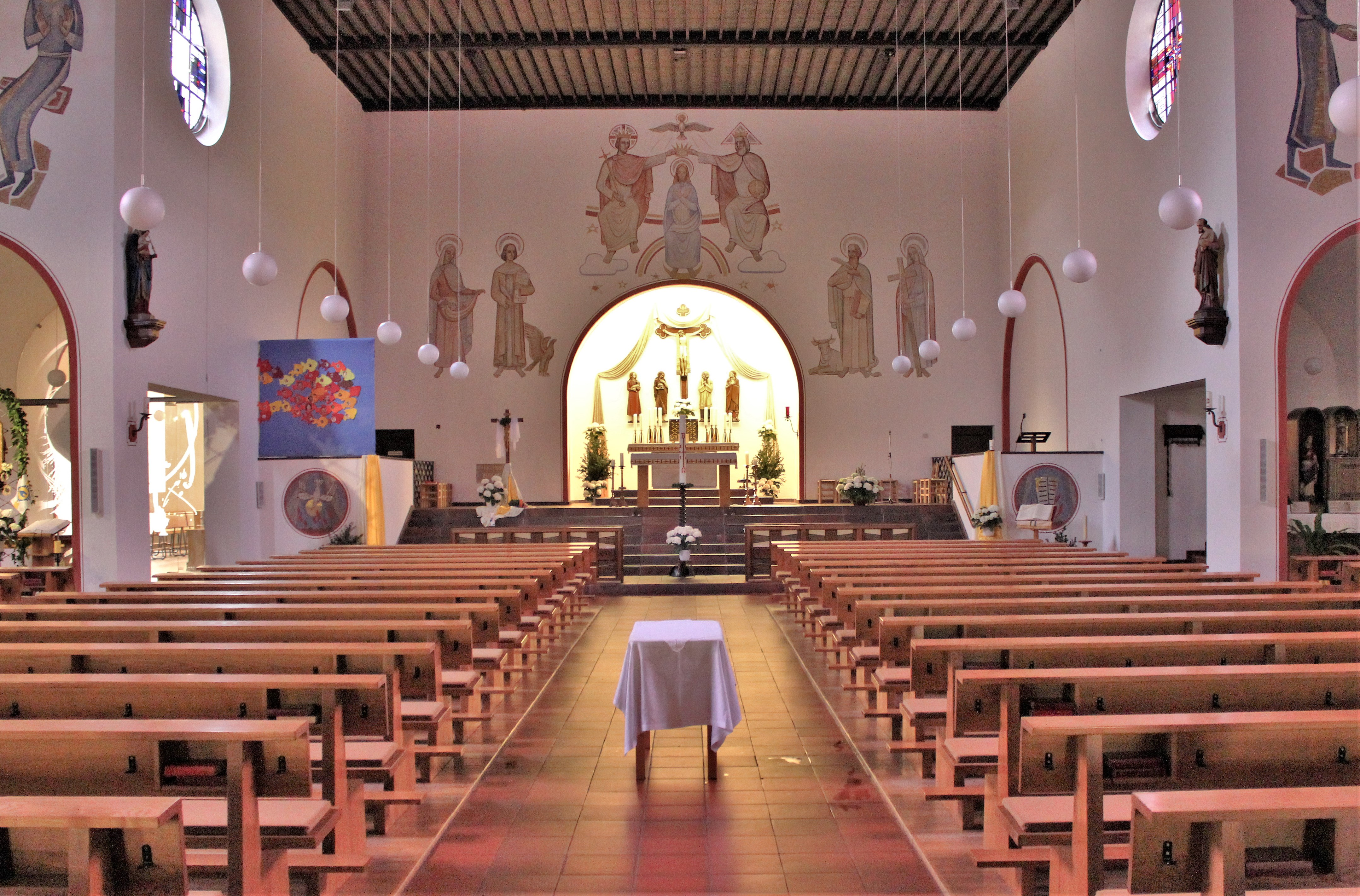 Blick ins Innere der katholischen Pfarrkirche St. Maria Magdalena in Brotdorf, einem Stadtteil von Merzig, Landkreis Merzig-Wadern, Saarland.